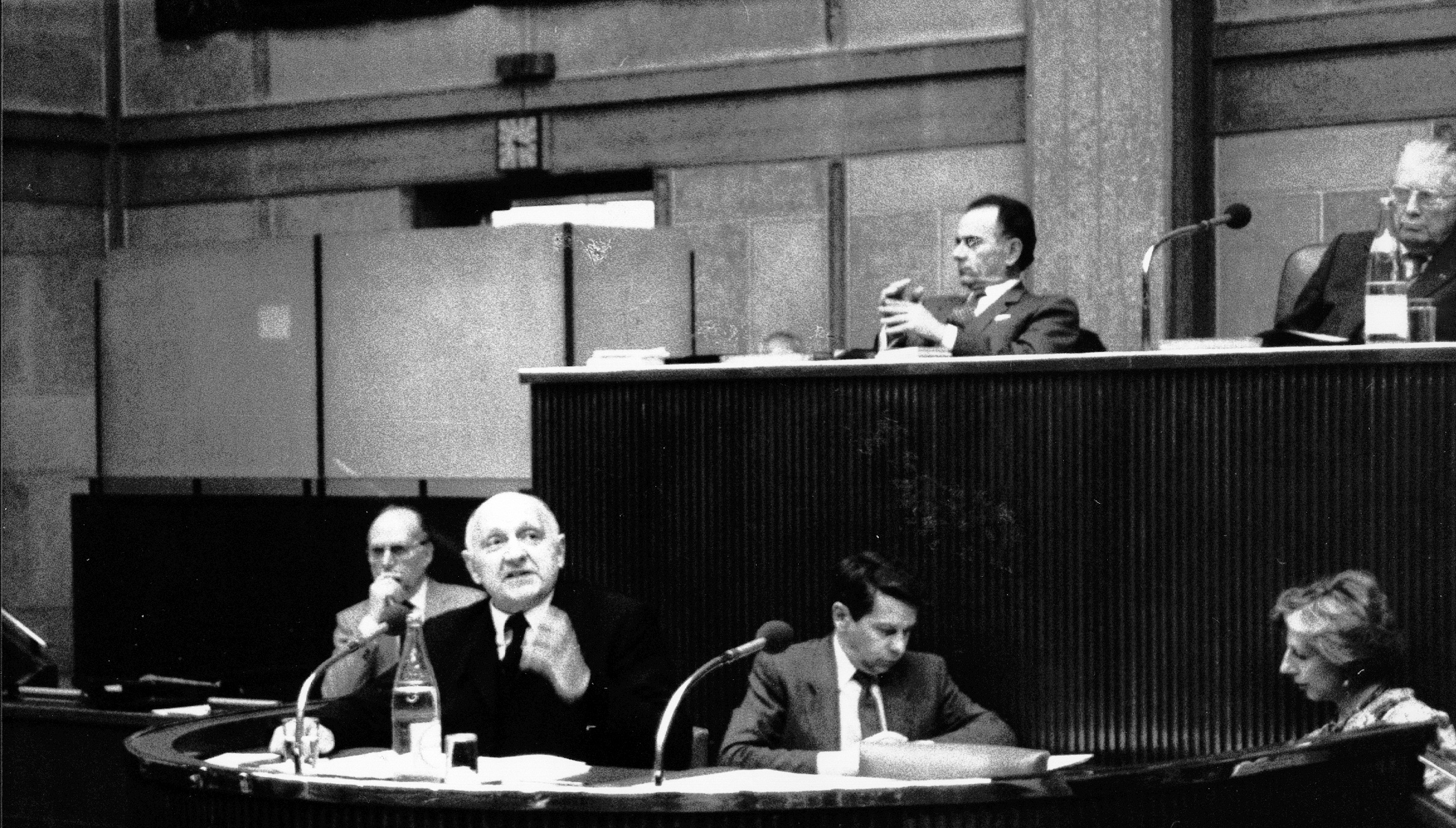 Le père Joseph Wresinski, membre du CES, présente le rapport "Grande pauvreté économique et sociale", lors de la séance plénière des 10 et 11 février 1987